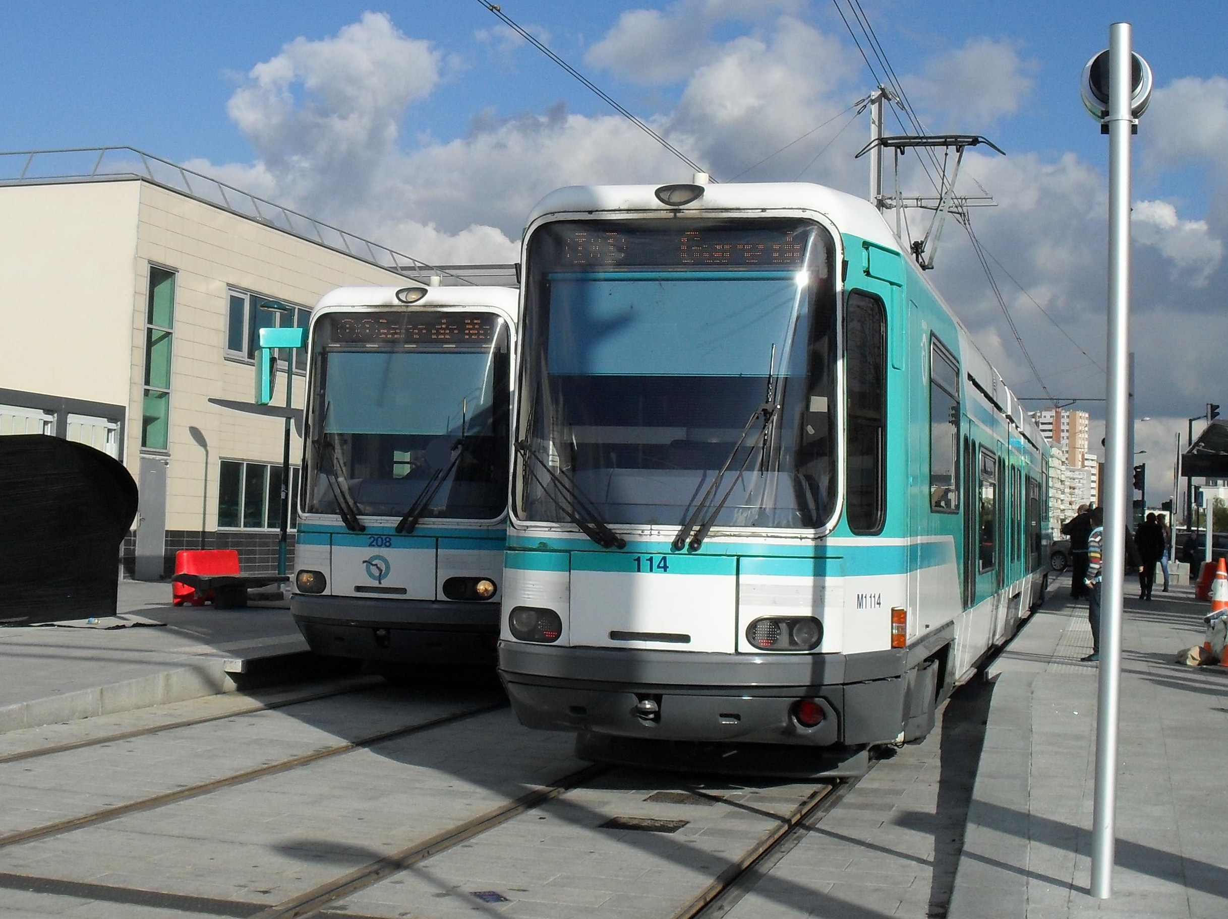 Paris Tramway ligne 1